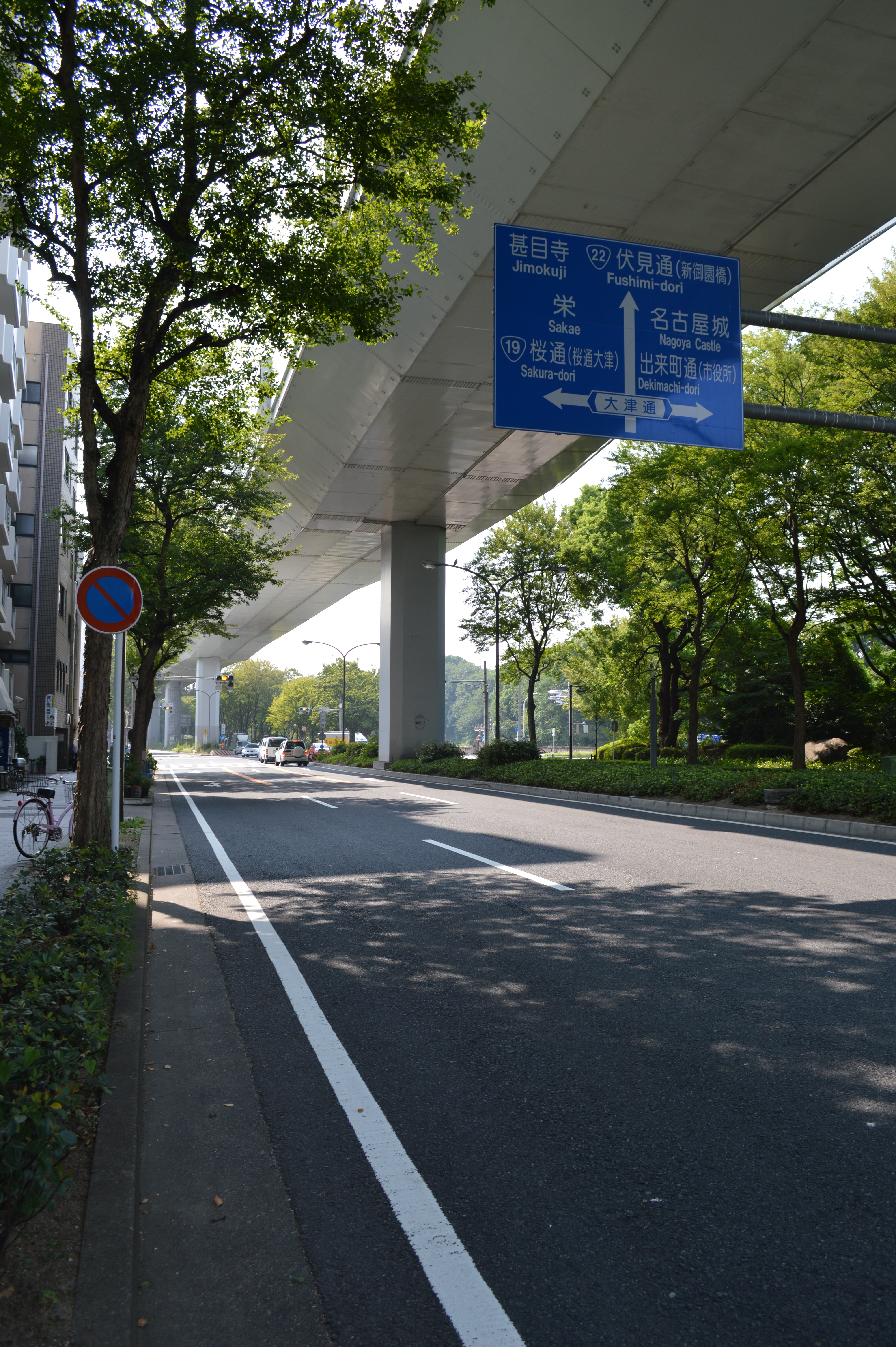 愛知県名古屋市の外堀通、中区の大津橋付近